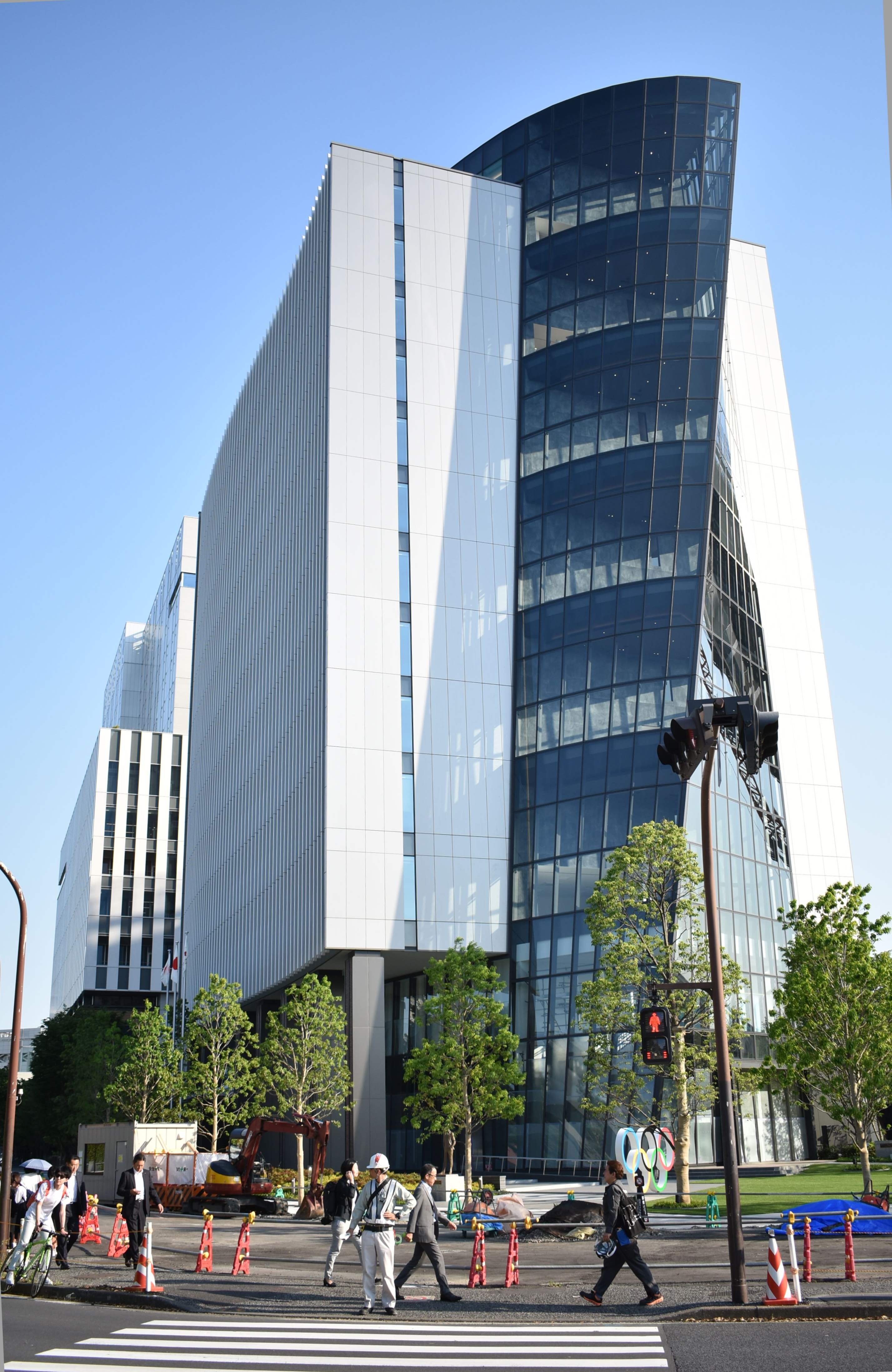 日本スポーツ協会 Nikon D3400